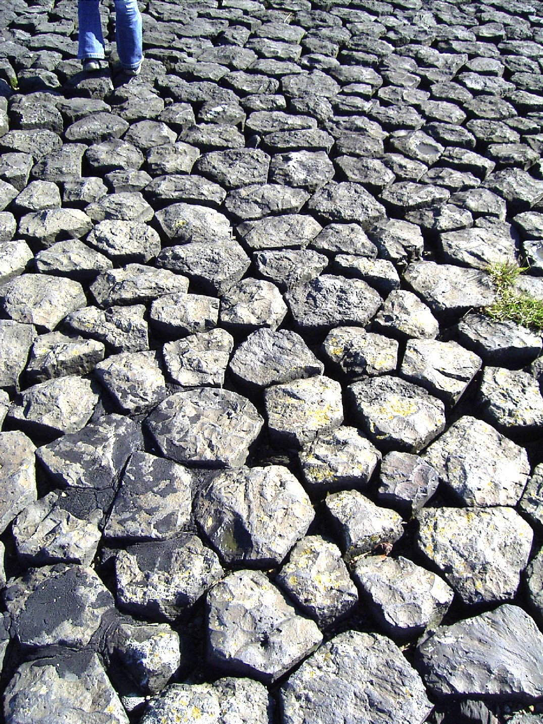 Küstenbefestigung im Tidebereich der Hafeneinfahrt von Neuharlingersiel aus Basaltsteinen deren Zwischenräume mit Asphalt ausgegossen sind.